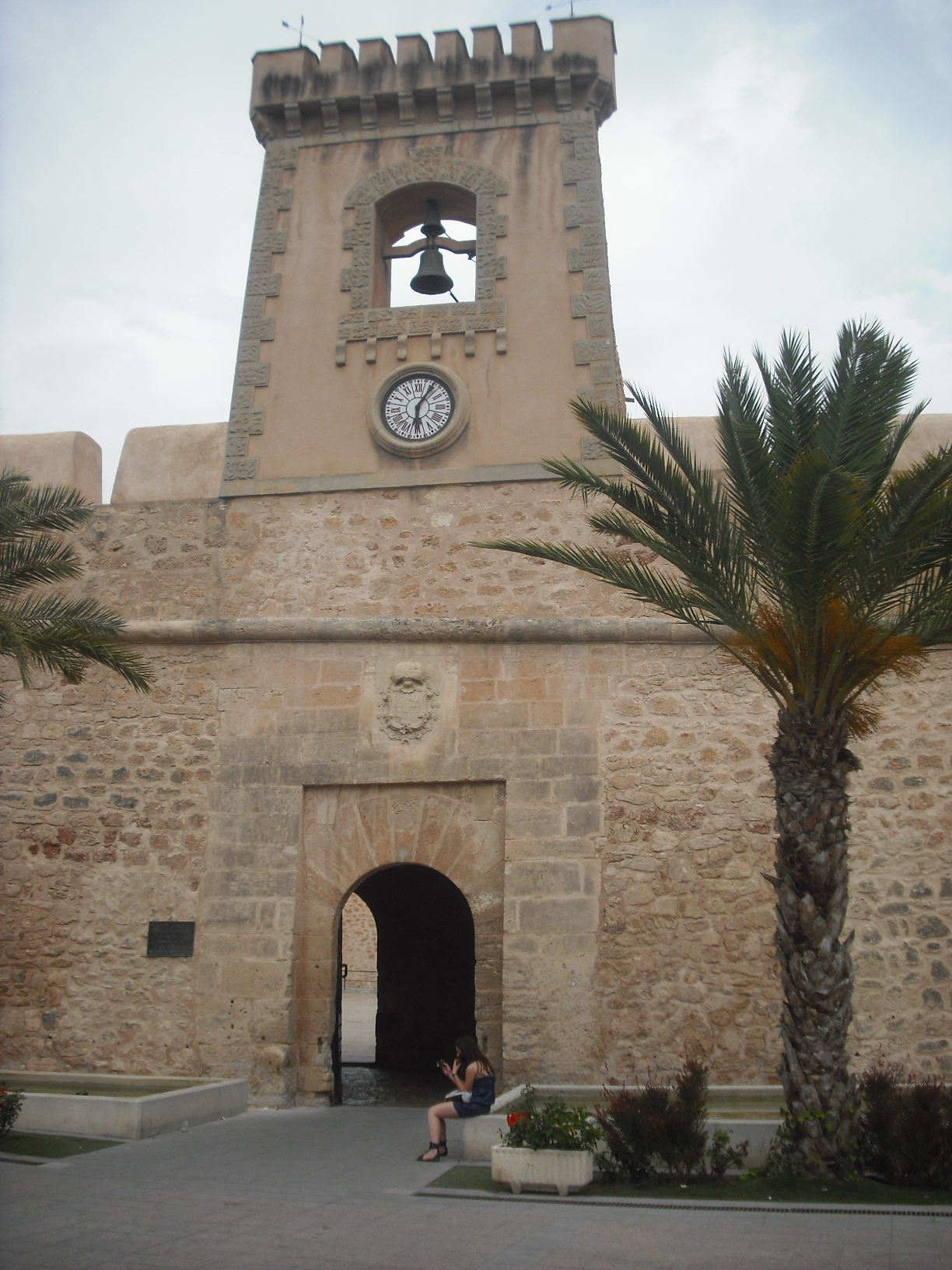 Porta est del castell de Santa Pola.